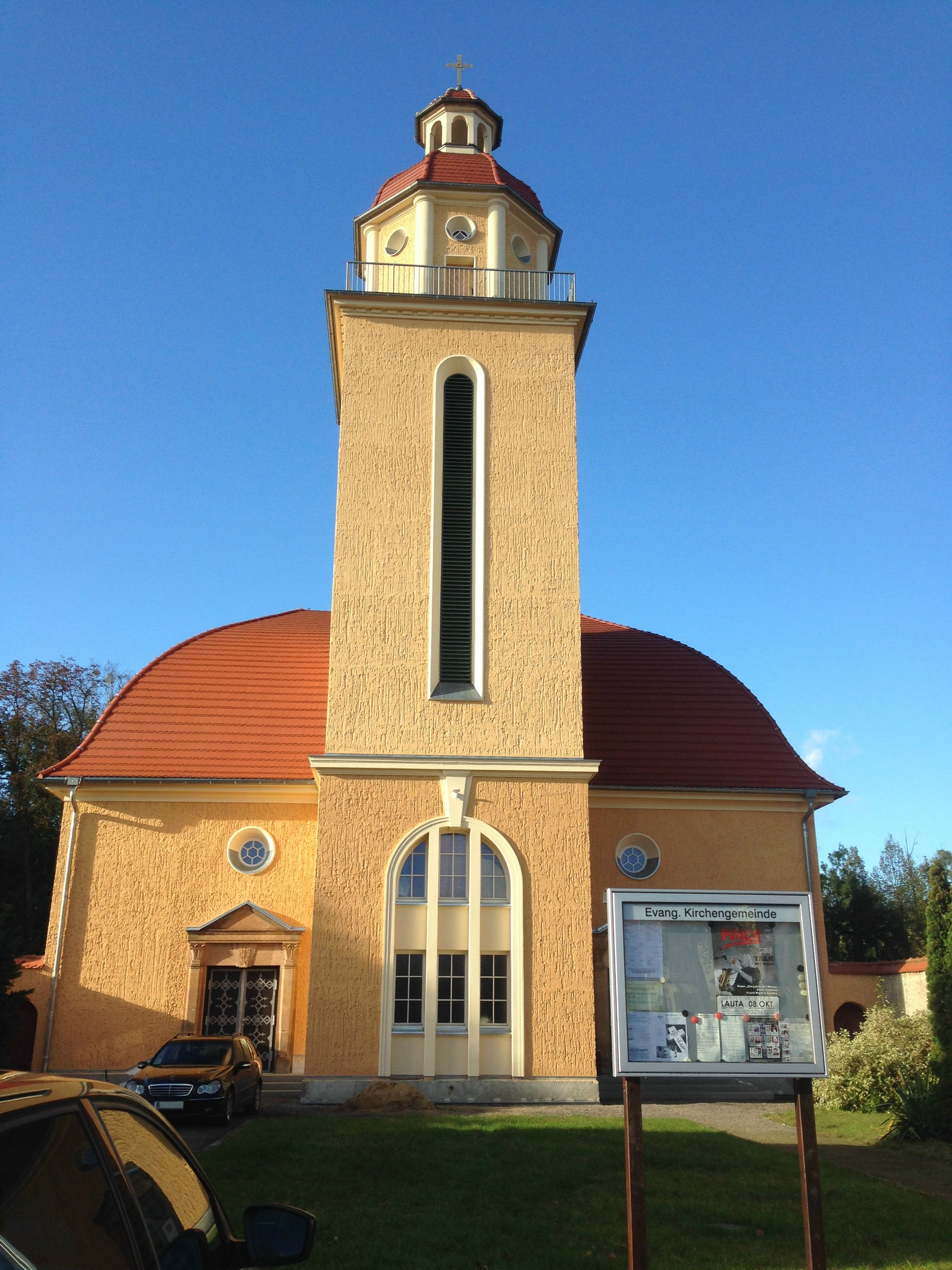 Die fast fertig sanierte Ev. Kirche Lauta-Stadt wird seit 2016 sowohl als Gotteshaus als auch als Kulturstätte genutzt, in der Konzerte, Lesungen, Theater- und Kinovorführungen stattfinden.